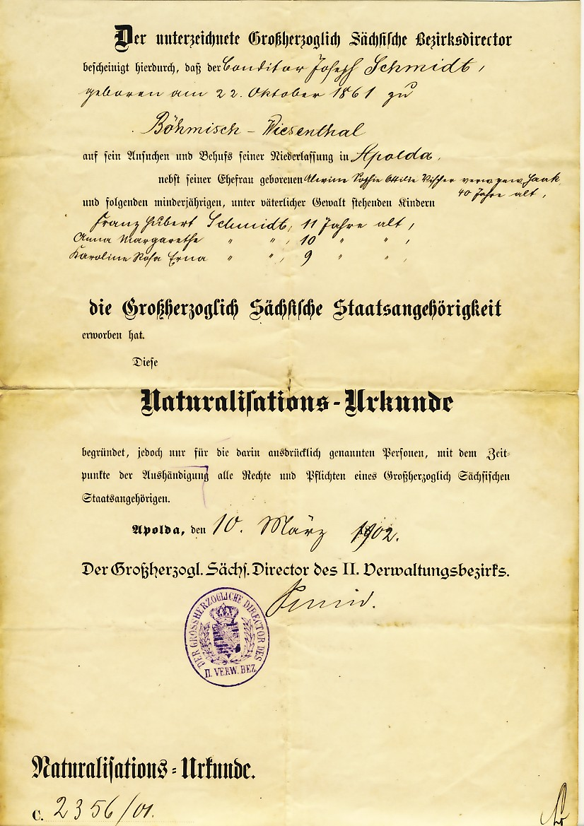 Naturalisations-Urkunde Josef Schmidt 1902